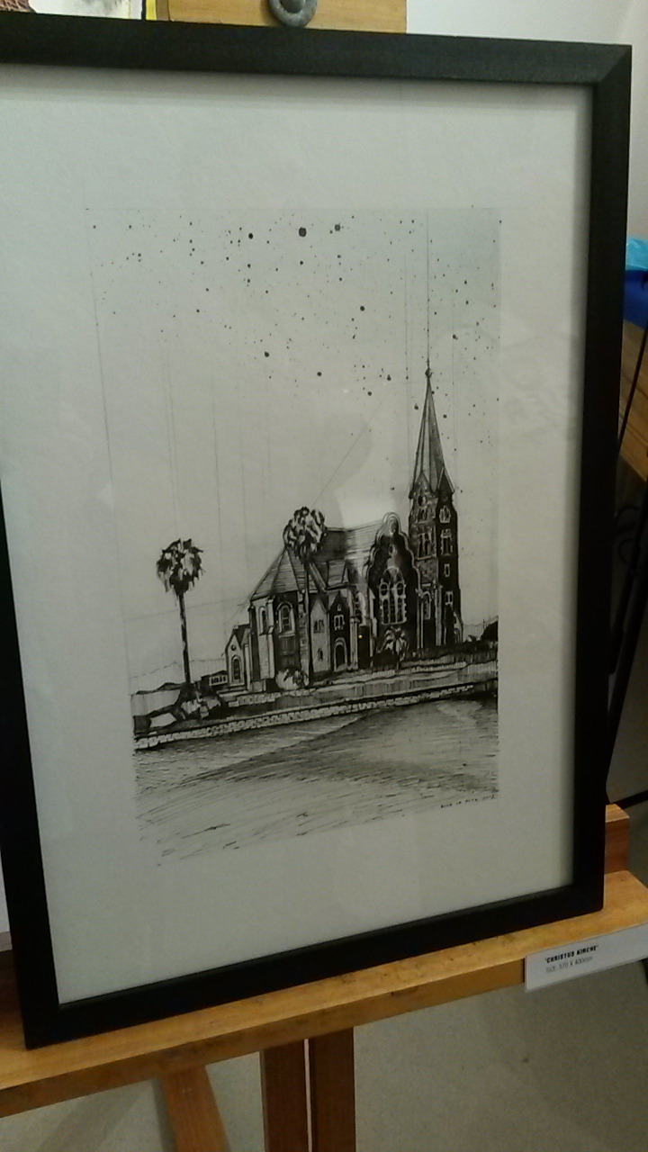 Auktionsstück für den Launch der 21. Felsgrafitti am 23.11.2015 im Goethe-Zentrum Windhoek.